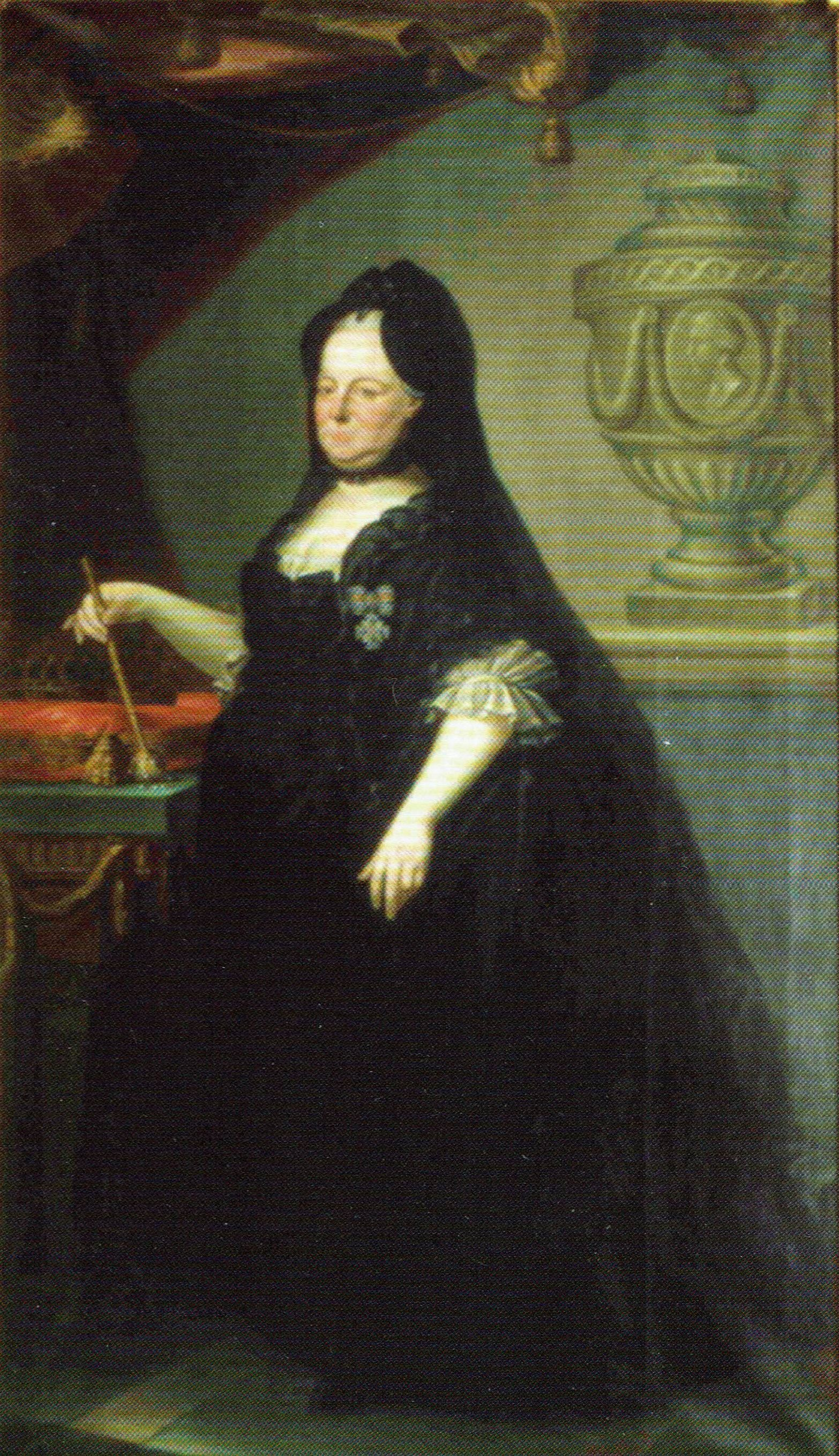 Maria Theresia. Kunstinventar der ALU Freiburg I/5